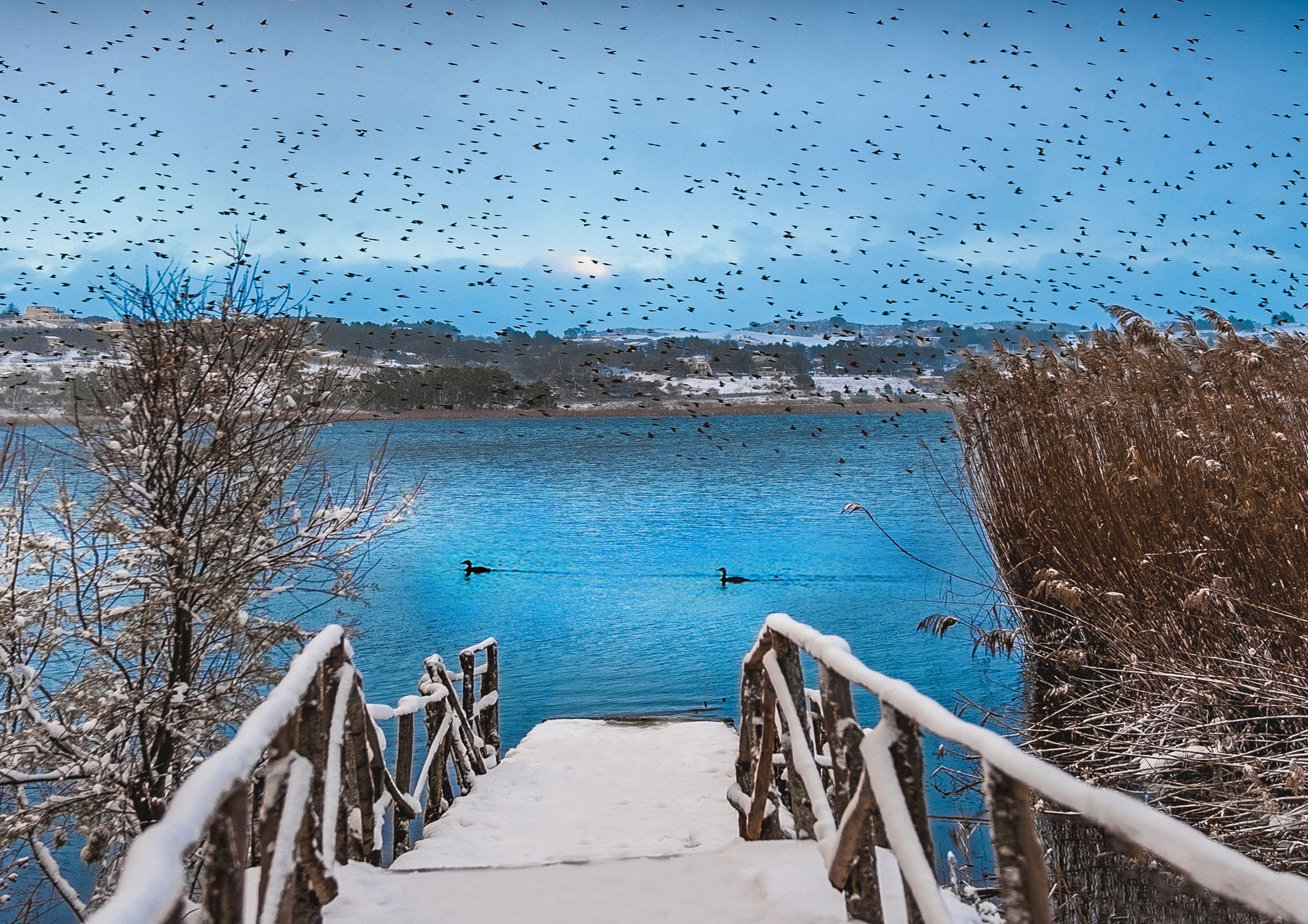 Lago di Pergusa (Autodromo)